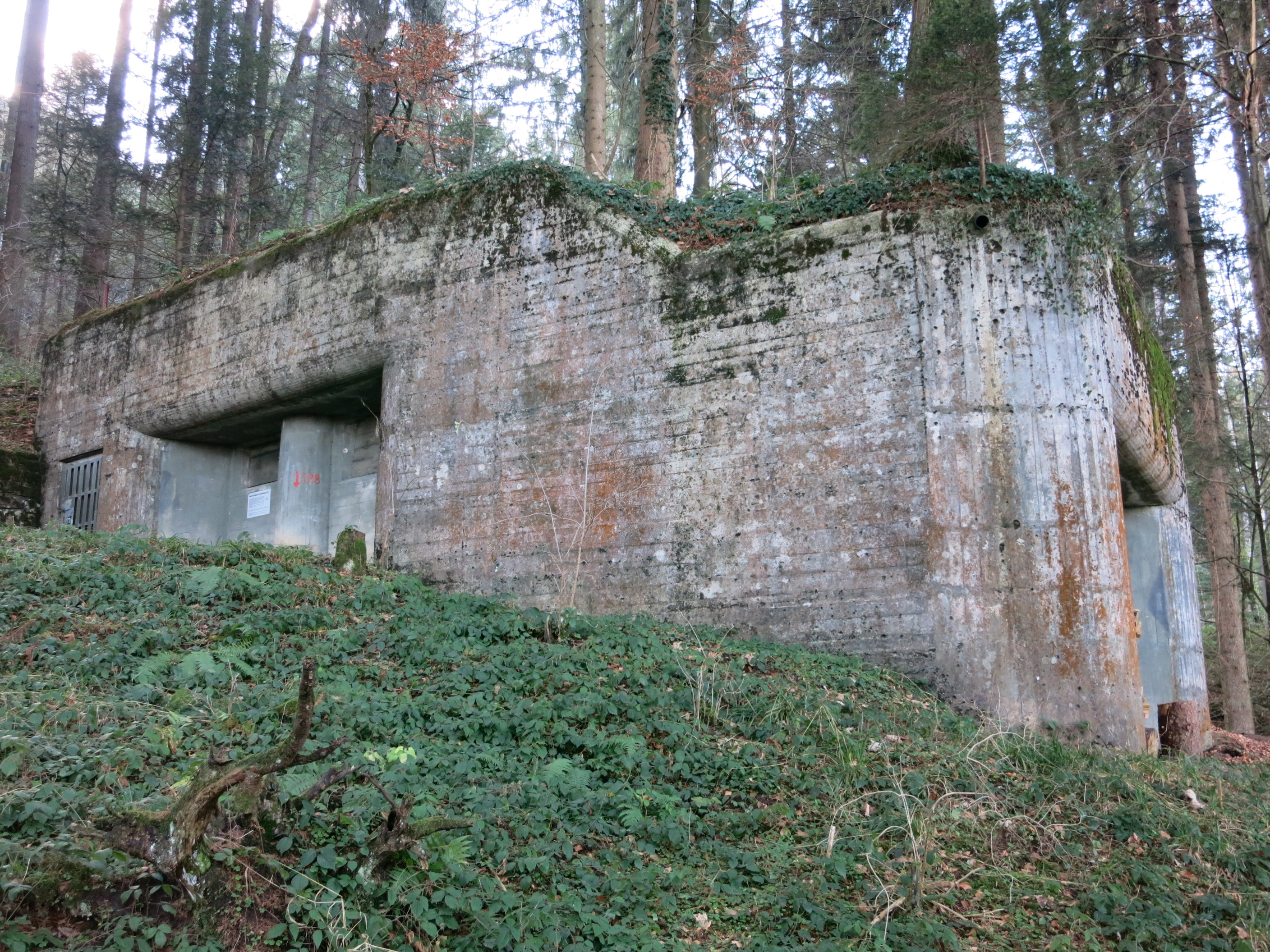 Sperrstelle Schindellegi SZ, Schweiz